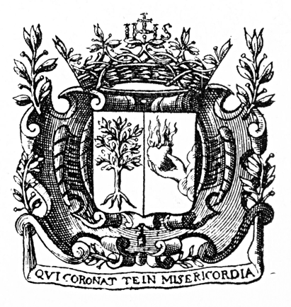 Numérisation des armoiries des Augustines, partie de la page frontispice des « Constitutions de la congrégation des religieuses hospitalières de la miséricorde de Jésus, de l’ordre de Saint-Augustin, 1666 », rééditées en 1910 par les Augustines de la Miséricorde de Jésus de Roberval, Roberval (Quebec), Quebec. Permalien et notice complète